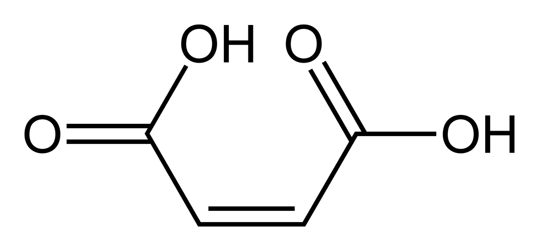 Skeletal formula of maleic acid